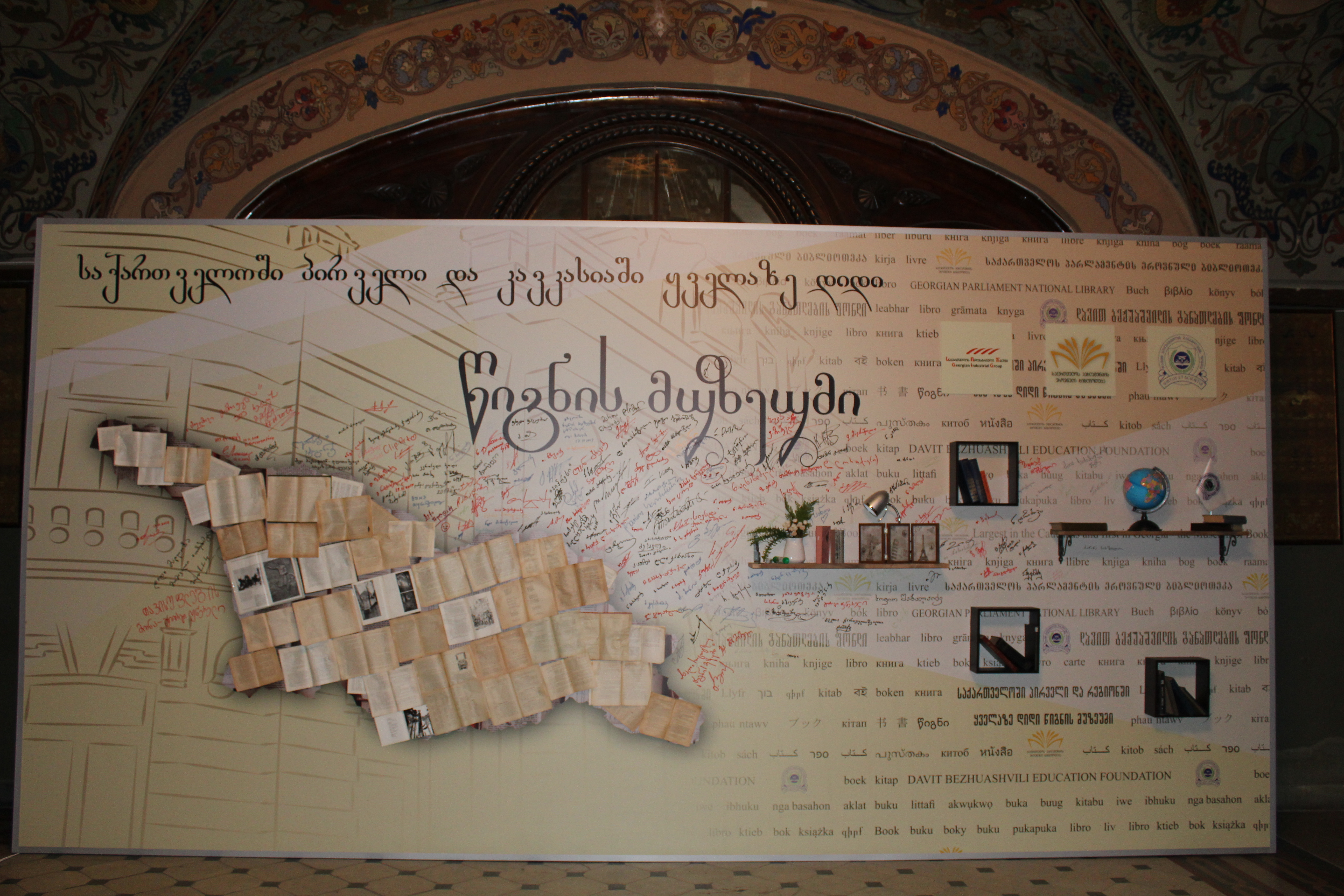 წიგნის მუზეუმი